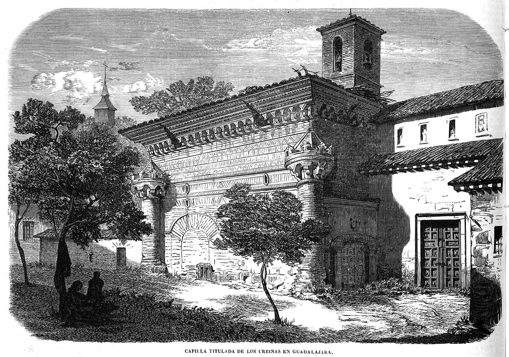 Capilla titulada de los Urbinas en Guadalajara, en la revista española El Museo Universal.